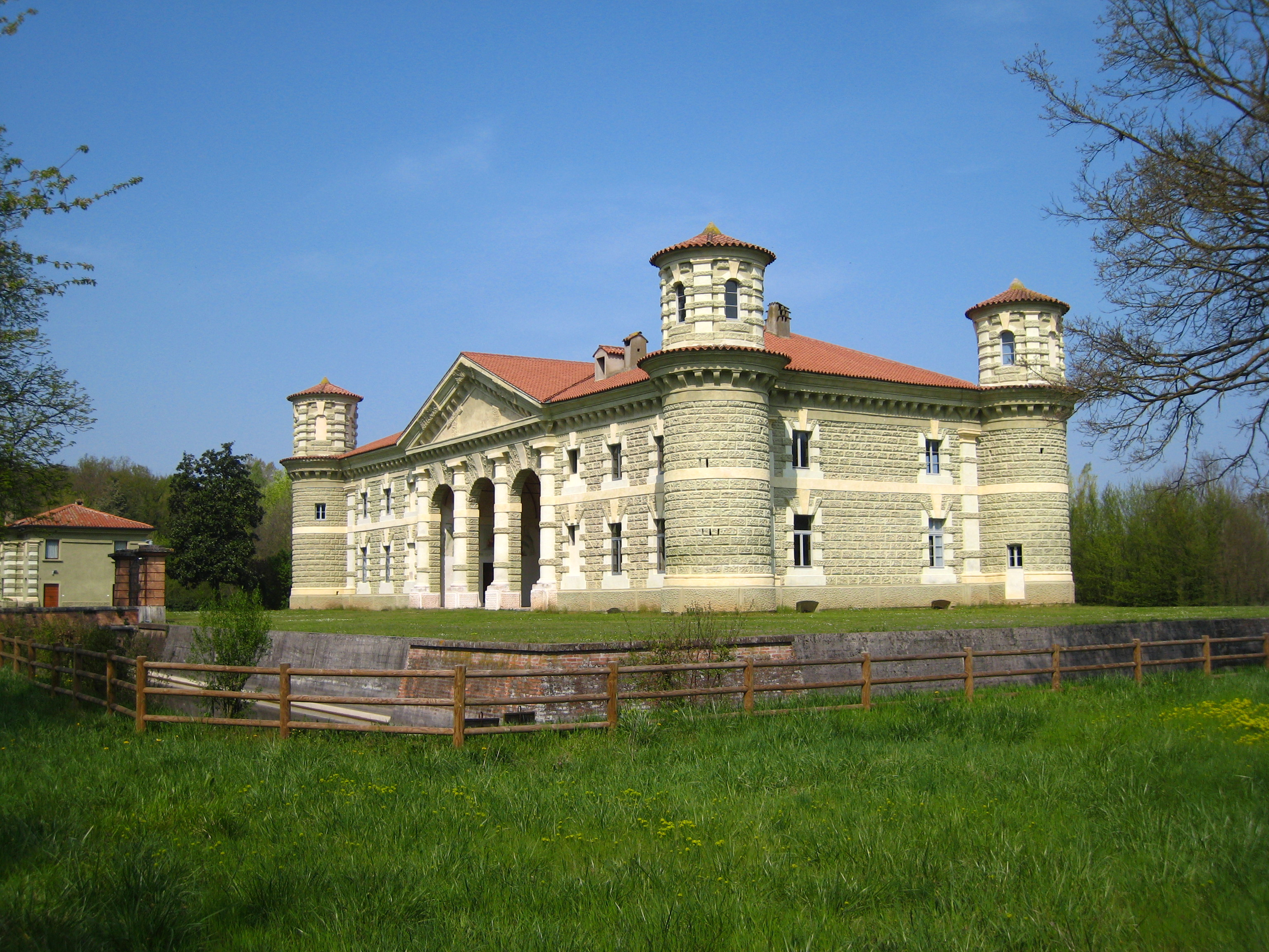 La palazzina all'interno del Bosco Fontana di Marmirolo (Mantova) 10 aprile 2010